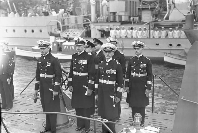 Kiel, Indienststellung U-45 Indienststellung G.580/U-45 am 25.06.1938 [Kiel, Krupp Germaniawerft AG, Indienststellung U-Boot U-45, Kapitänleutnant (KptLt) Klaus Ewerth (vorne links), Ehrenabordnung]